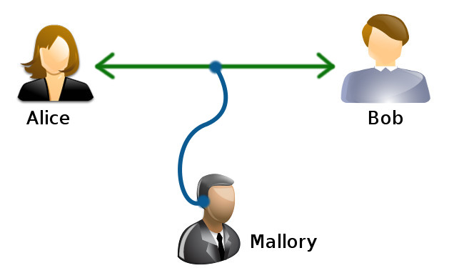 Alice und Bob sind Synonyme für Sender und Empfänger einer Nachricht. Sie werden verwendet, um Erklärungen auf den Gebieten der Kryptographie, der Netzwerkprotokolle und der Physik zu vereinfachen. Mallory ist ein Lauscher oder Angreifer, der versucht Nachrichten mitzuhören oder zu manipulieren.